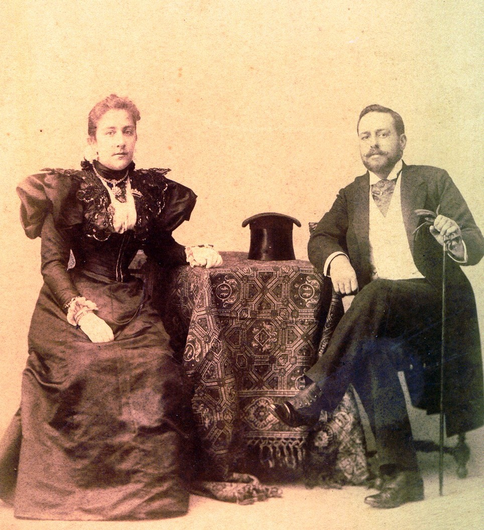 Retrato fotográfico de Don Gonzalo Dávila de Ágreda y Doña Mercedes de León y Manjón, Marqueses de Mirabal